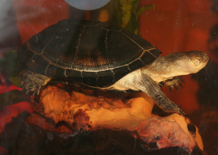 Pelusios castaneus im Aqaterrarium (ca. 3 Jahre alt)